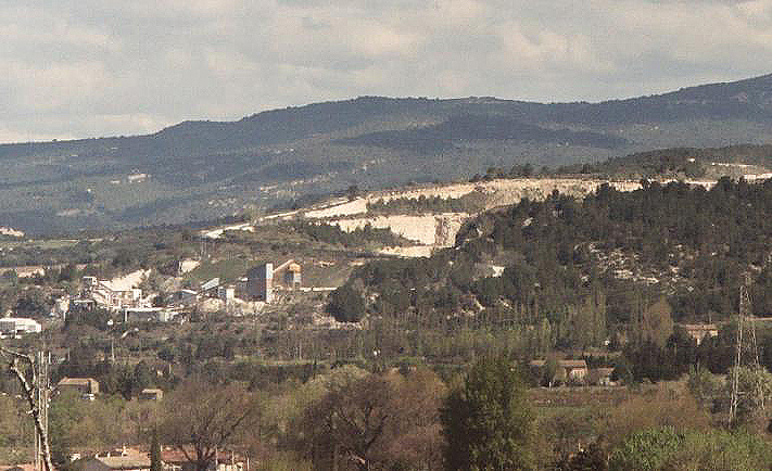 Département de Vaucluse/ Commune de Robion/ Four à chaux et carrière/ Vue d'ensemble/ Photo personnelle prise en 2005